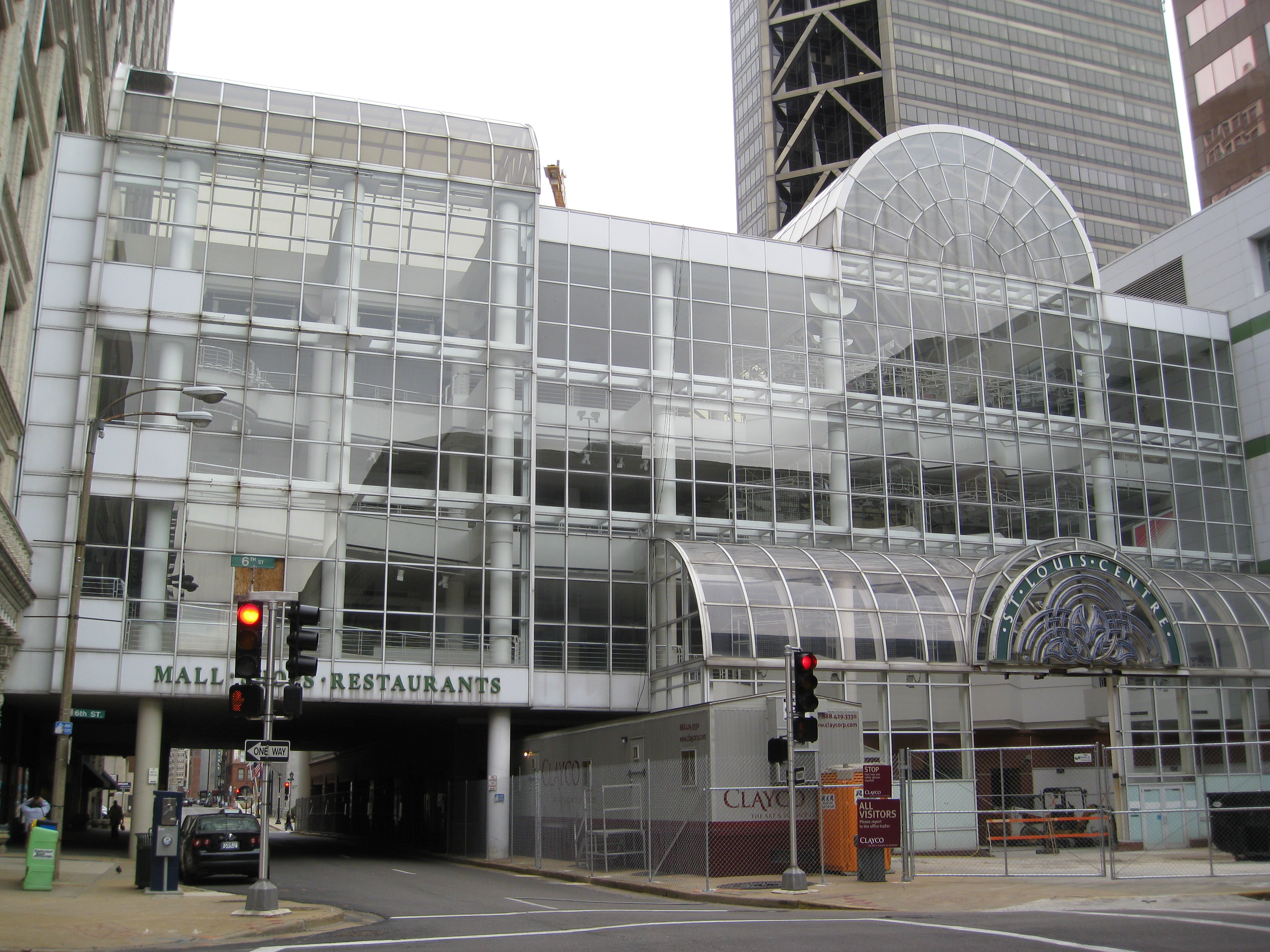 St. Louis, Missouri